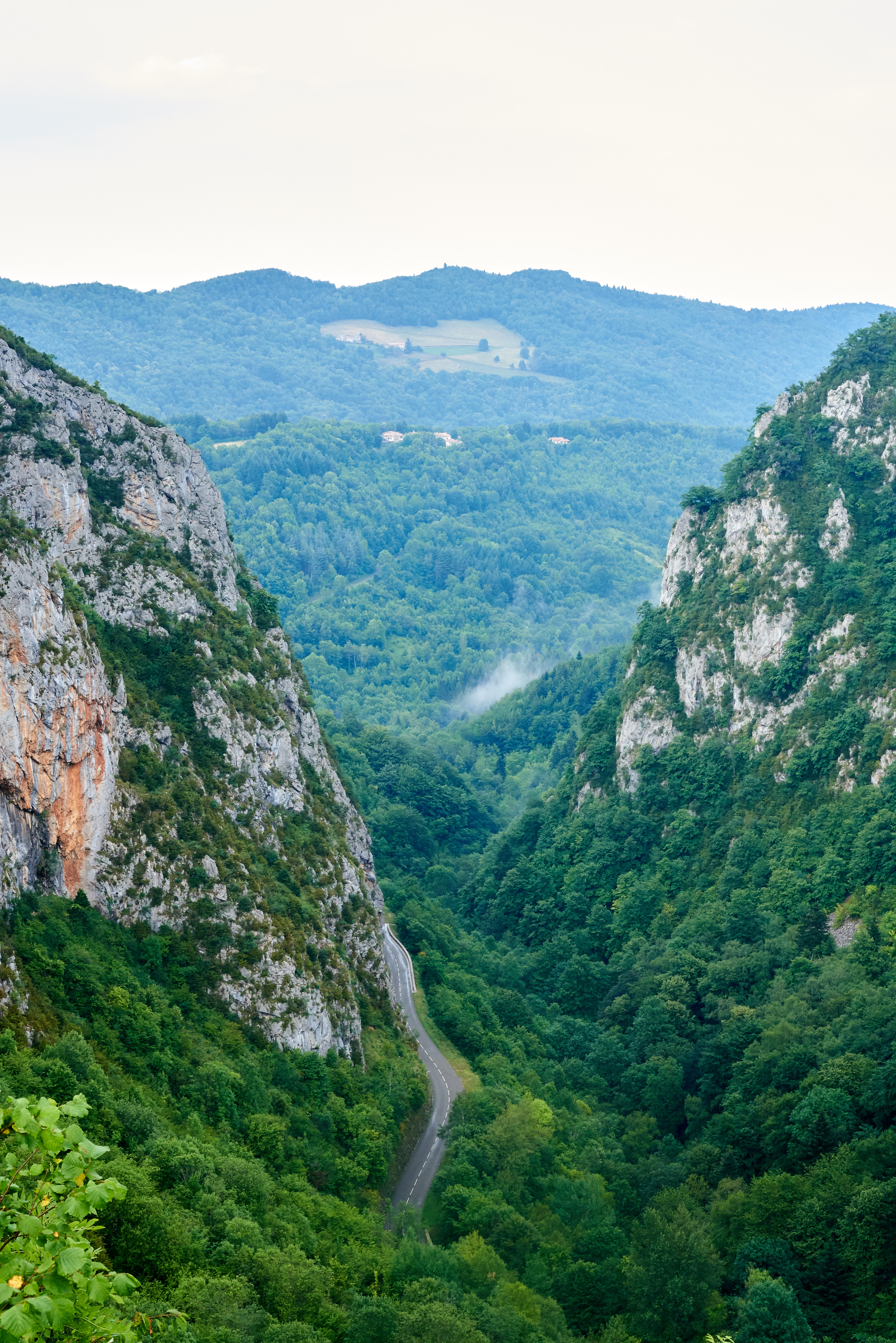 Gorge du Caoroulet